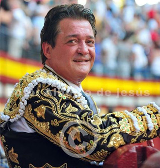 toros